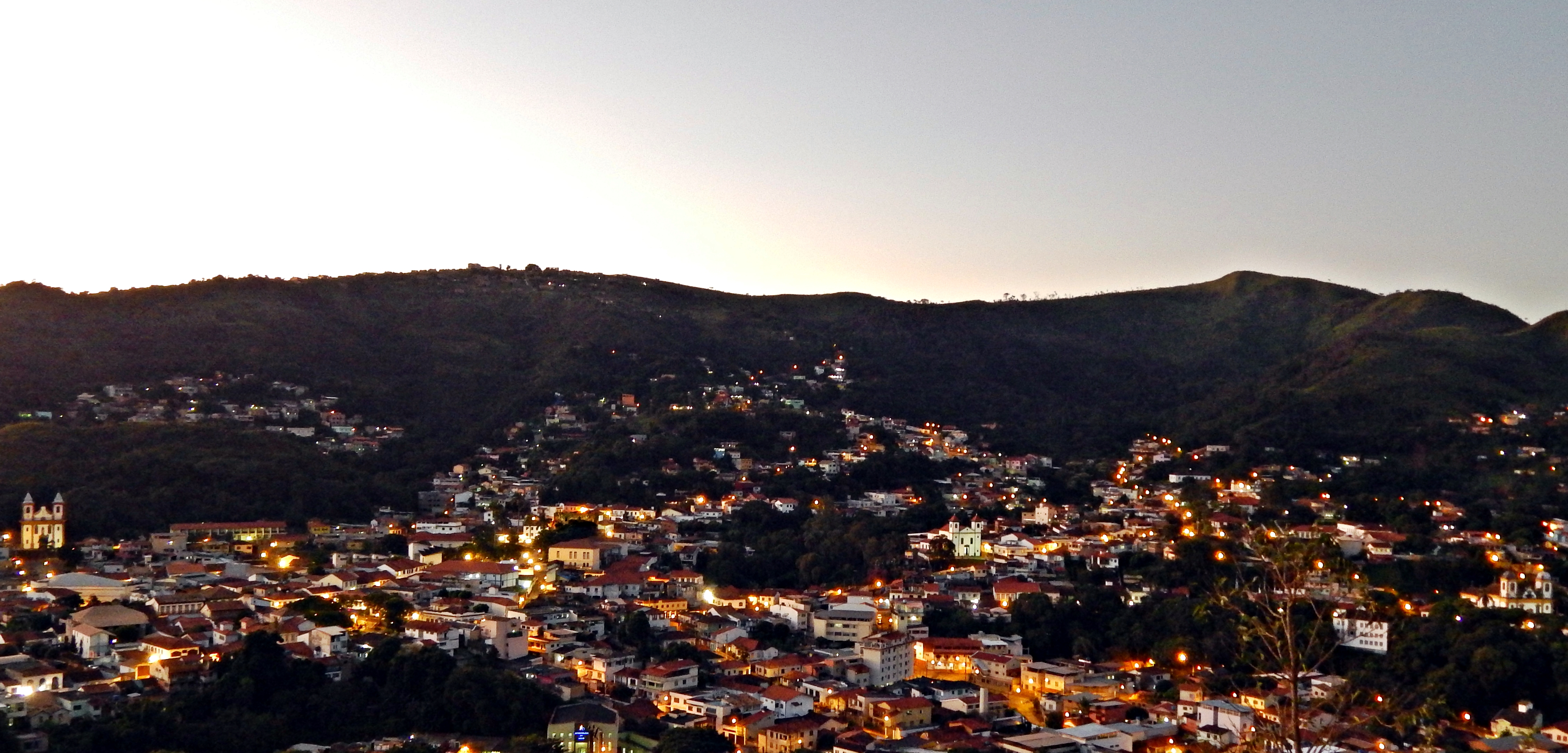 Centro Histórico de Sabará a noite, com a Igreja de São Francisco à esquerda, a inacabada Igreja de Nossa Senhora do Rosário ao centro e a Igreja de Nossa Senhora das Mercês à direita.